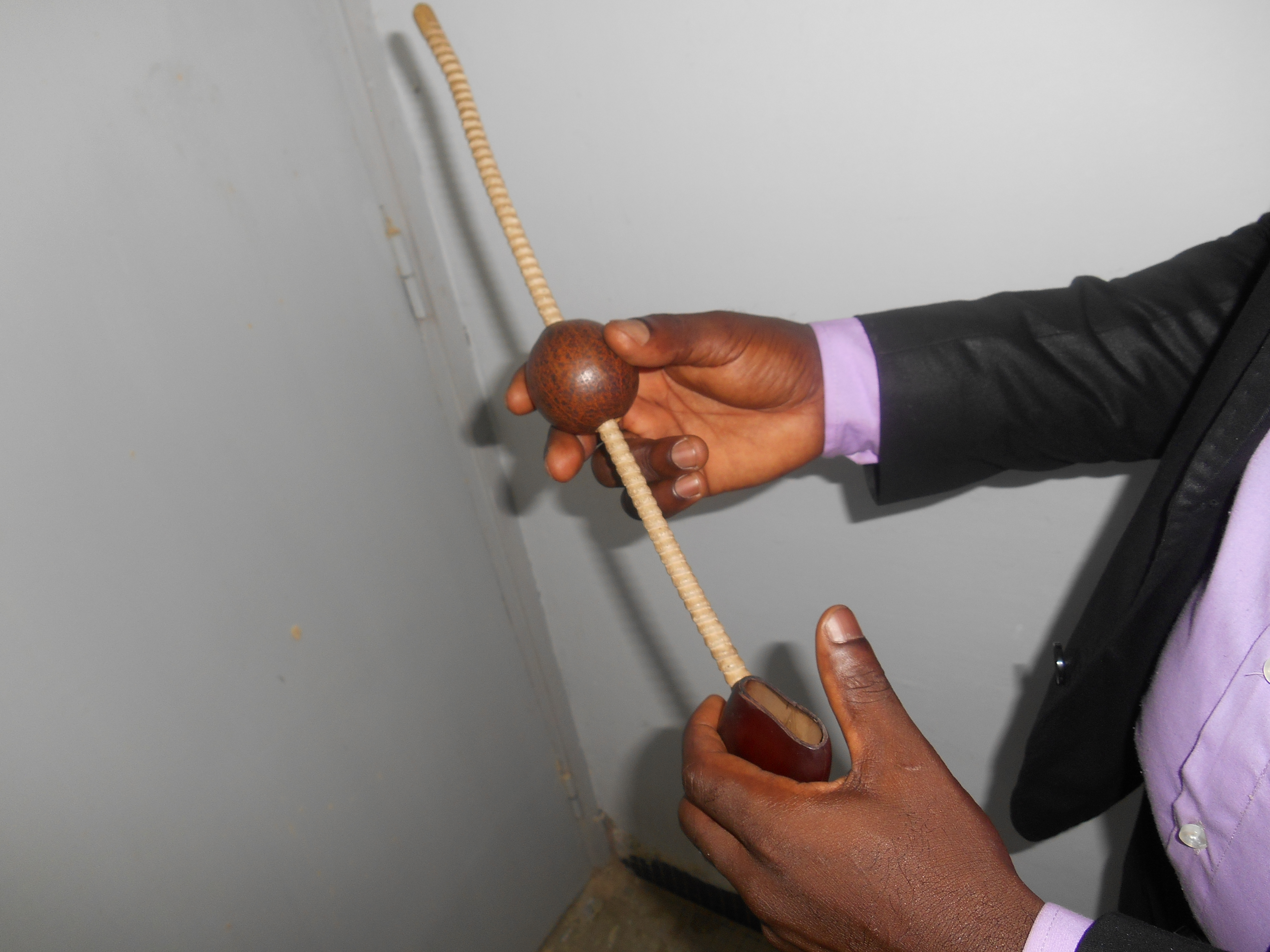 L'Ahoco est un instrument de musique traditionnelle des Baoulés, un peuple originaire du centre de la Côte d'Ivoire. Cet instrument est promu l'artiste chanteuse tradi-moderne ivoirienne Antoinette Konan. Il s'agit d'un bâton que l'on racle à l'aide d'une écorce de fruit séché et d'une coquille de noix aplatie. This is an image from Ivory Coast